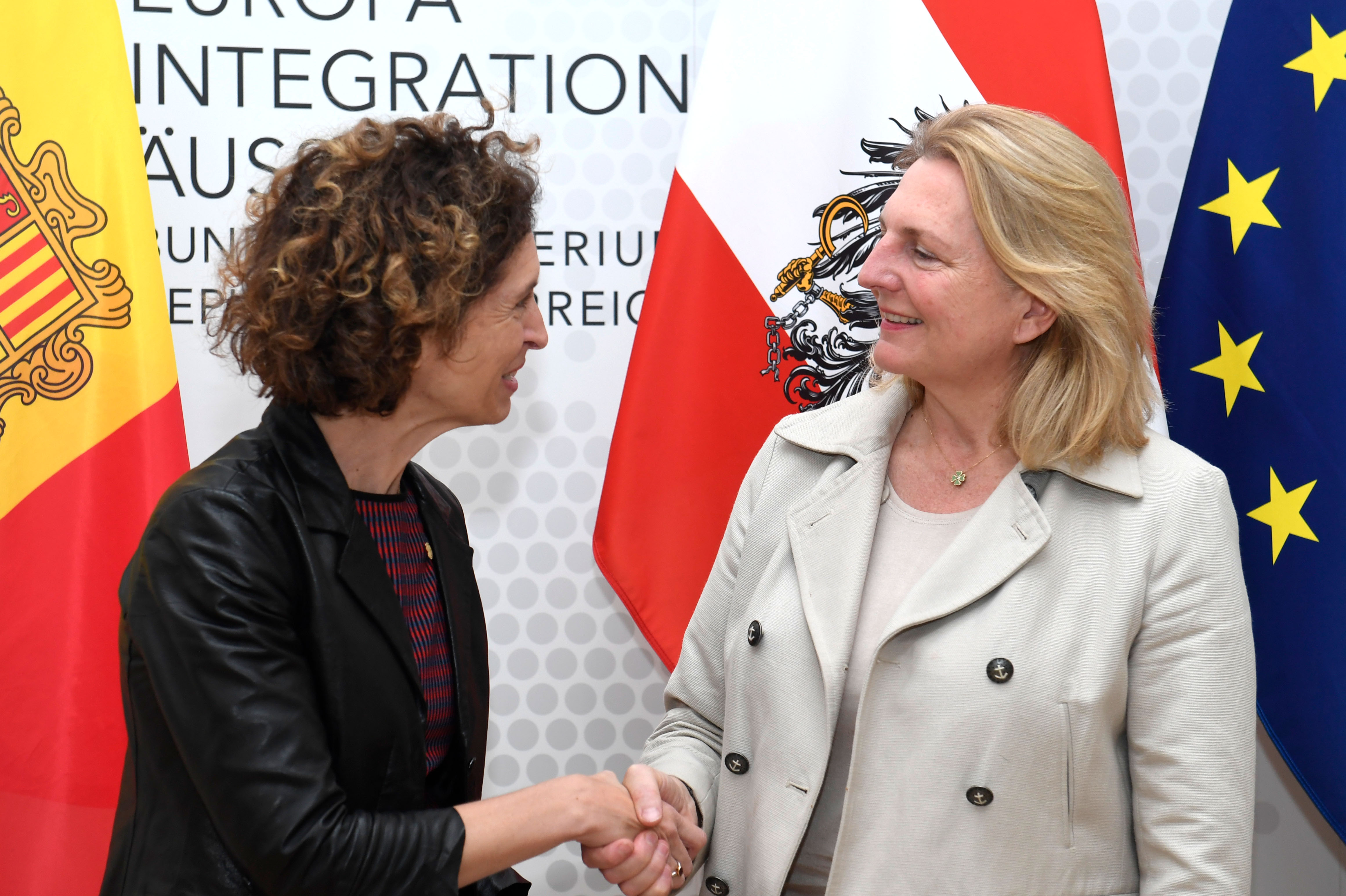 Die österreichische Außenministerin Karin Kneissl trifft die Außenministerin von Andorra Maria Ubach Font in Wien am 30. Oktober 2018.